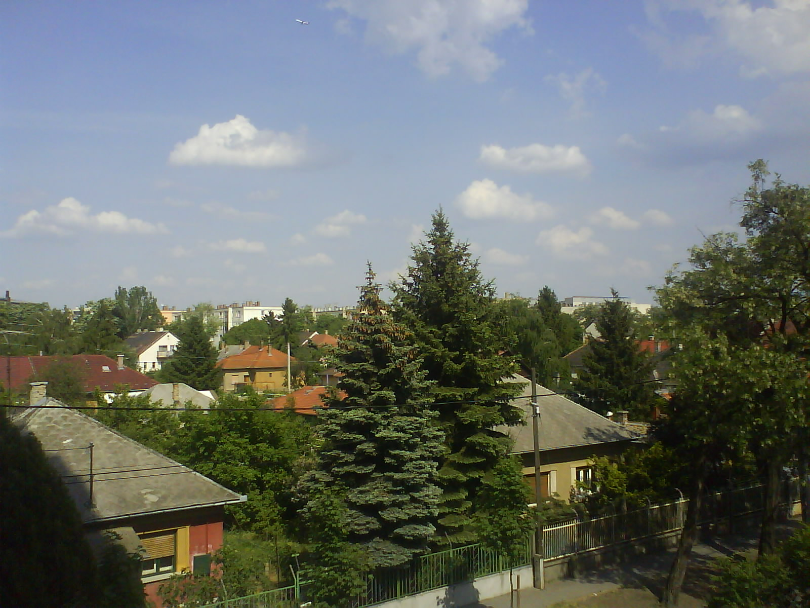 Kőbányai látkép (Budapest)